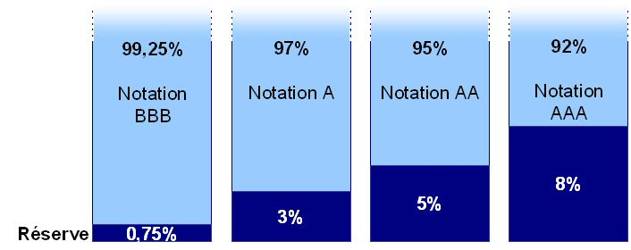 Description: Illustration du rehaussement de qualité crédit d'un portefeuille d'actifs Source: Bradypus Licence: Bradypus